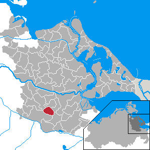 Neuenkirchen (bei Anklam), Landkreis Ostvorpommern, Mecklenburg-Vorpommern